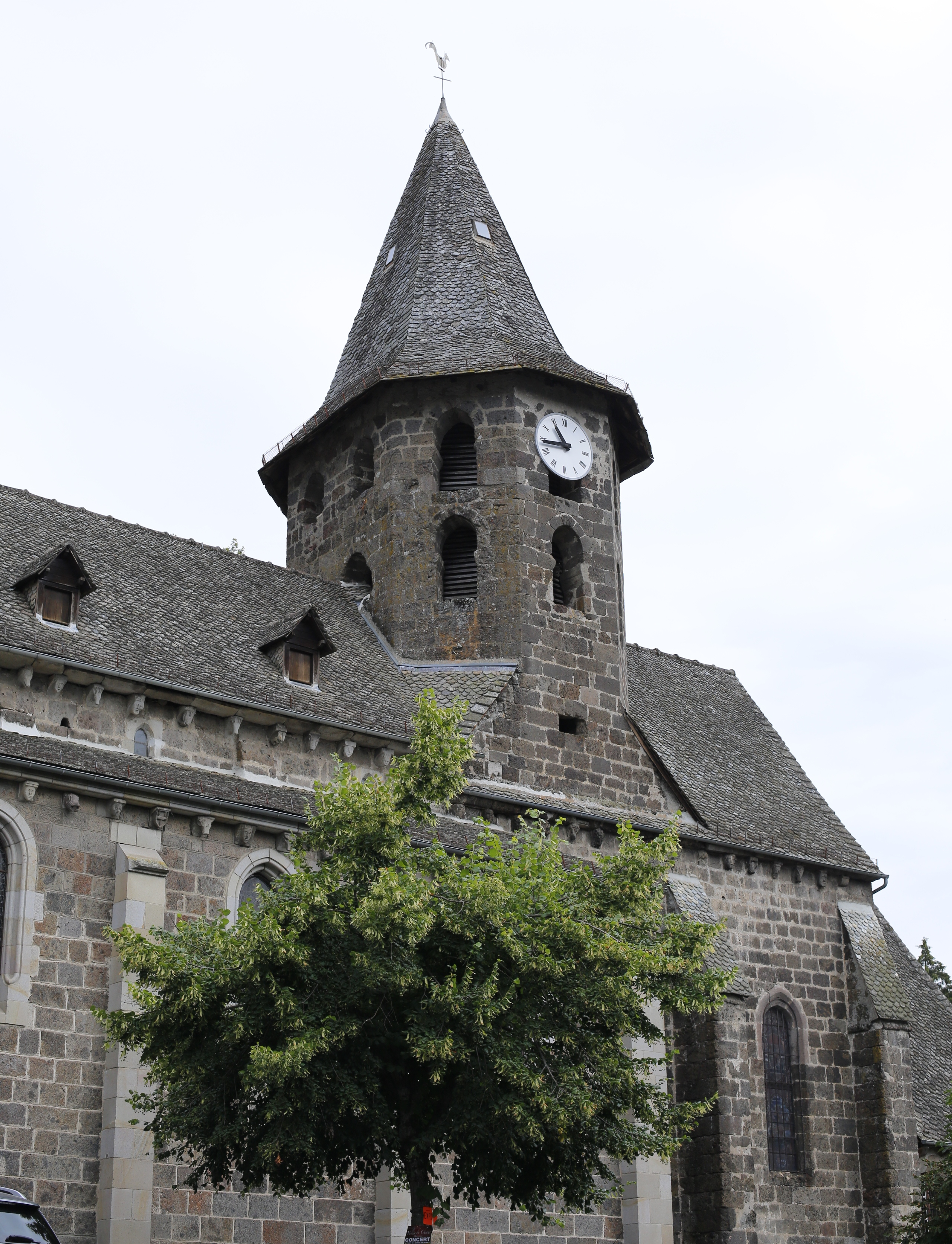 Église Saint-Pierre de Vic-sur-Cère .